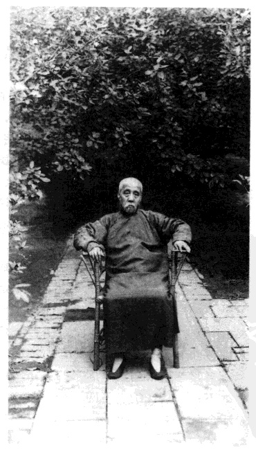 郭曾炘攝於1920s